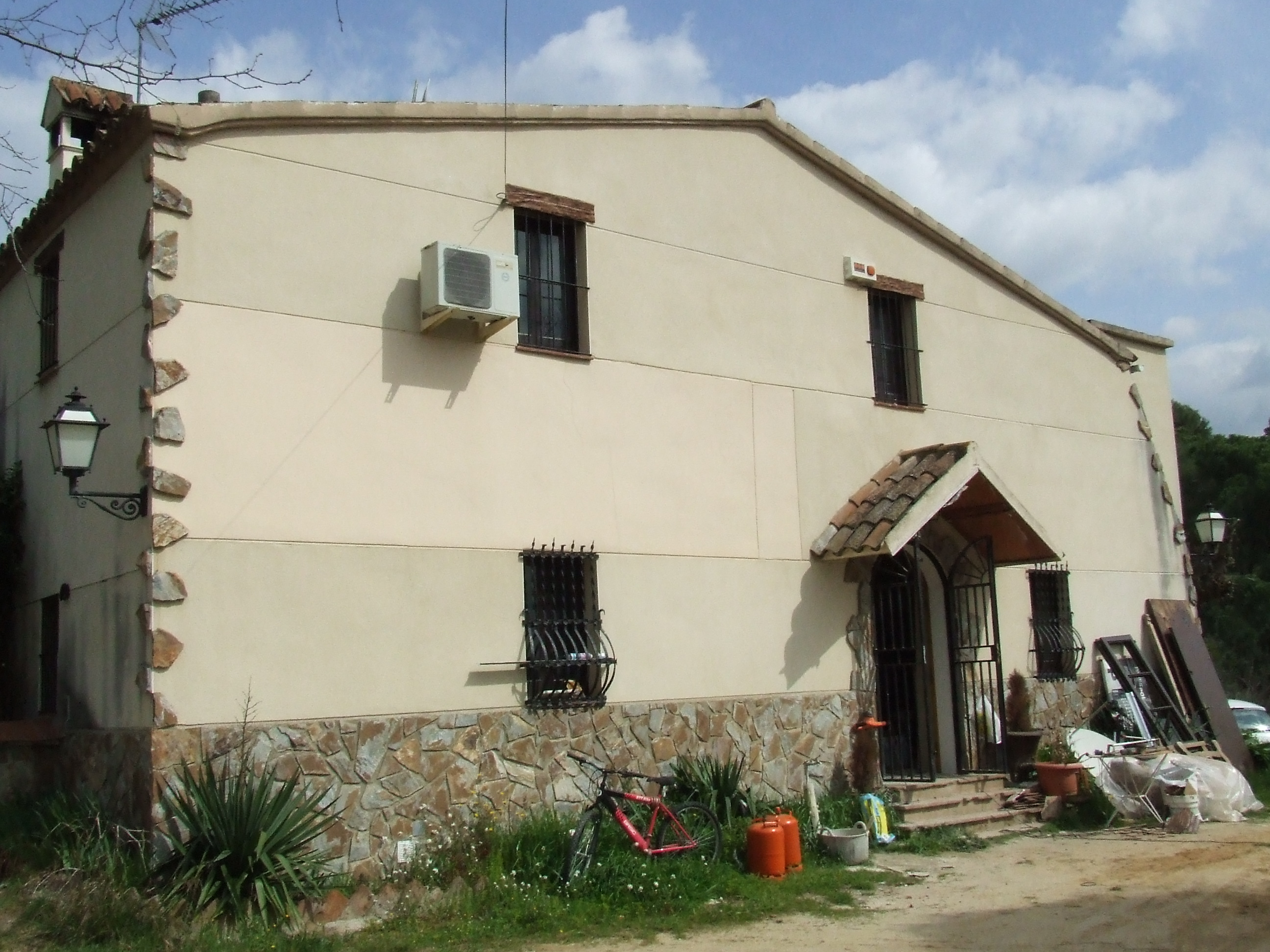 Can Boter (Bigues, Bigues i Riells, Vallès Oriental)